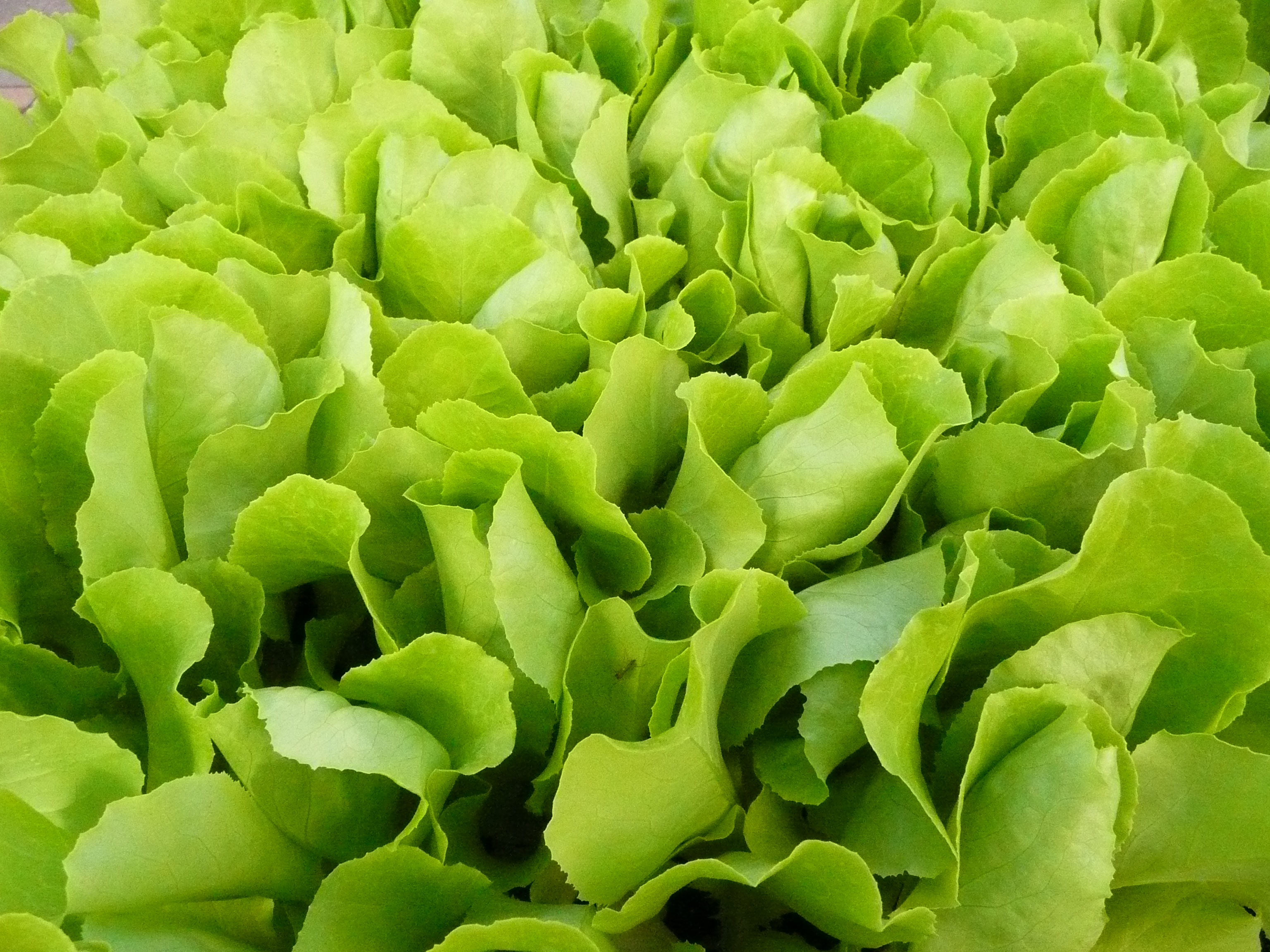 Kopfsalatsetzlinge (Lactuca sativa)